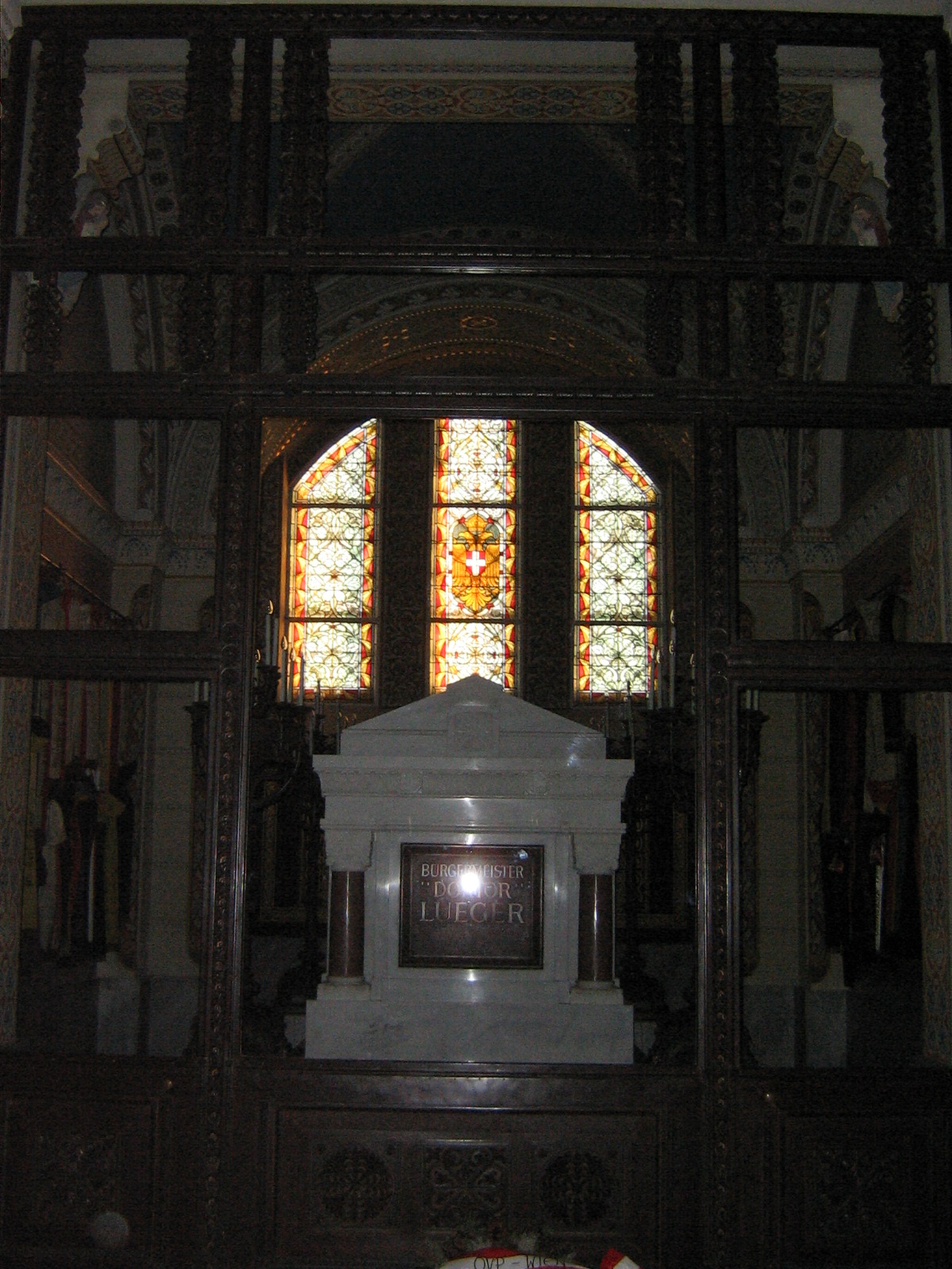 Das Grab von Dr. Karl Lueger in der Karl-Borromäus-Kirche in Wien